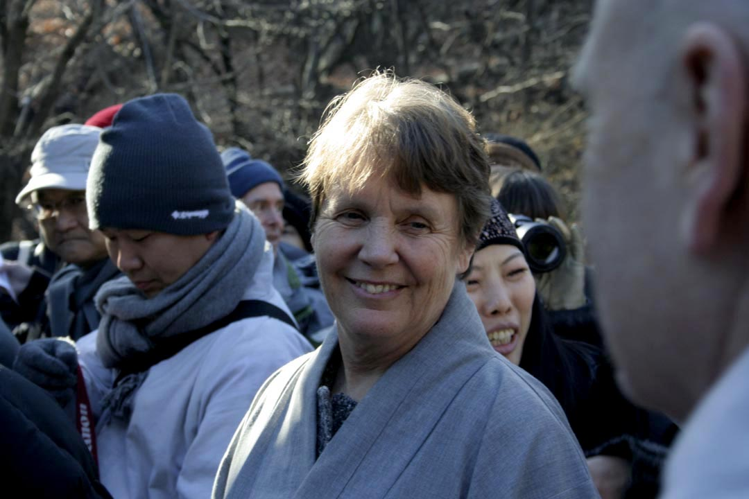 Zen master Soeng Hyang at the Zen Master Seung Sahn Memorial 2007